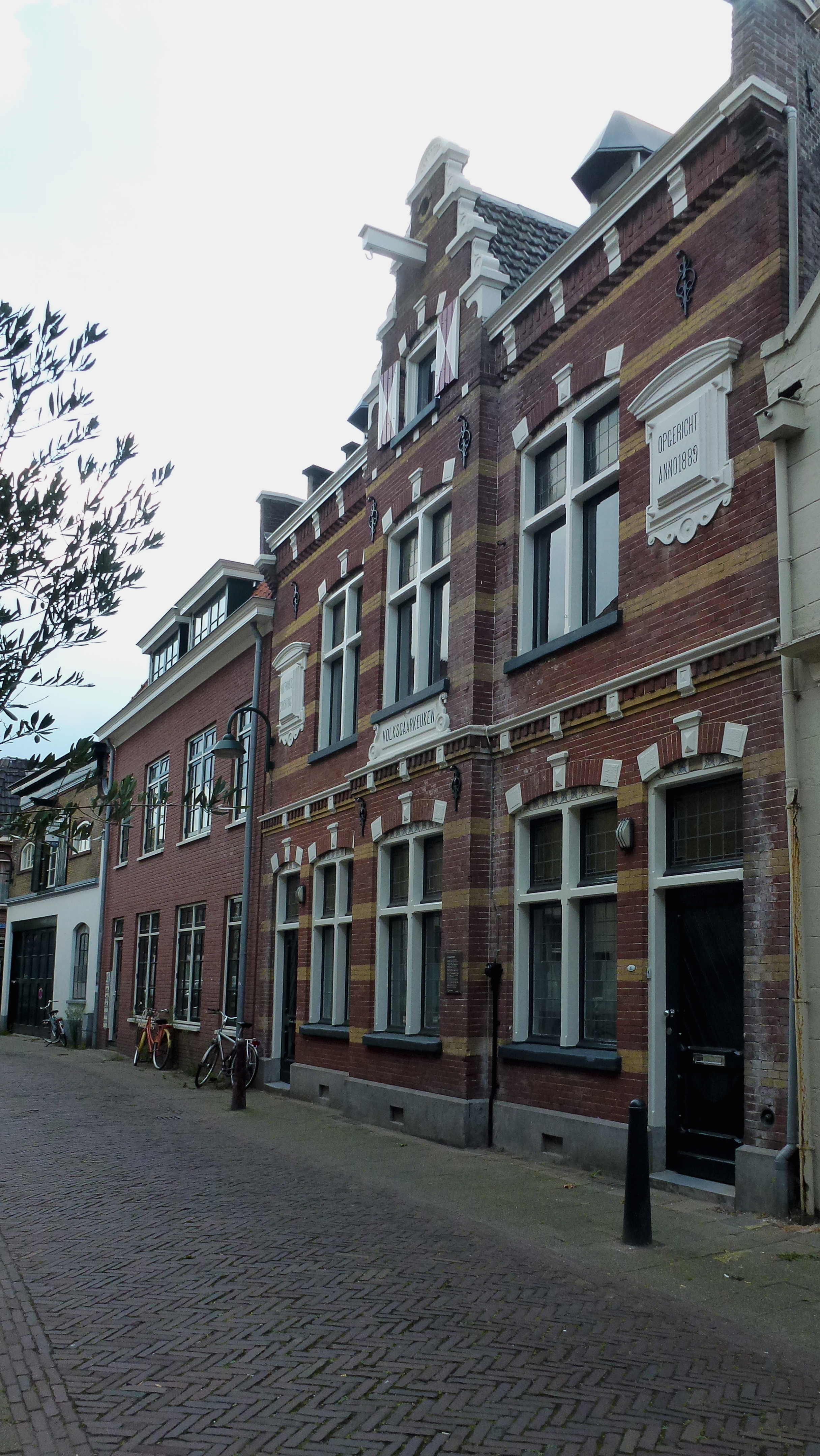 Voormalige gaarkeuken van de Henriëtta Hoffman stichting, nu in gebruik als woonhuis